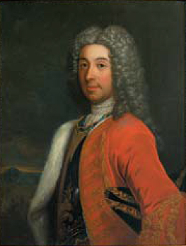 Porträt des Marquis de Lassay, Léon de Madaillan de Lesparre (1681-1750)